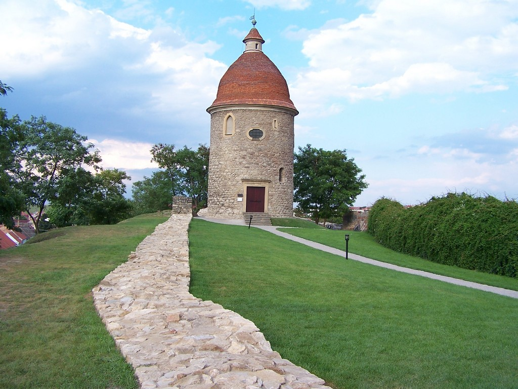 Rotunda in skalica